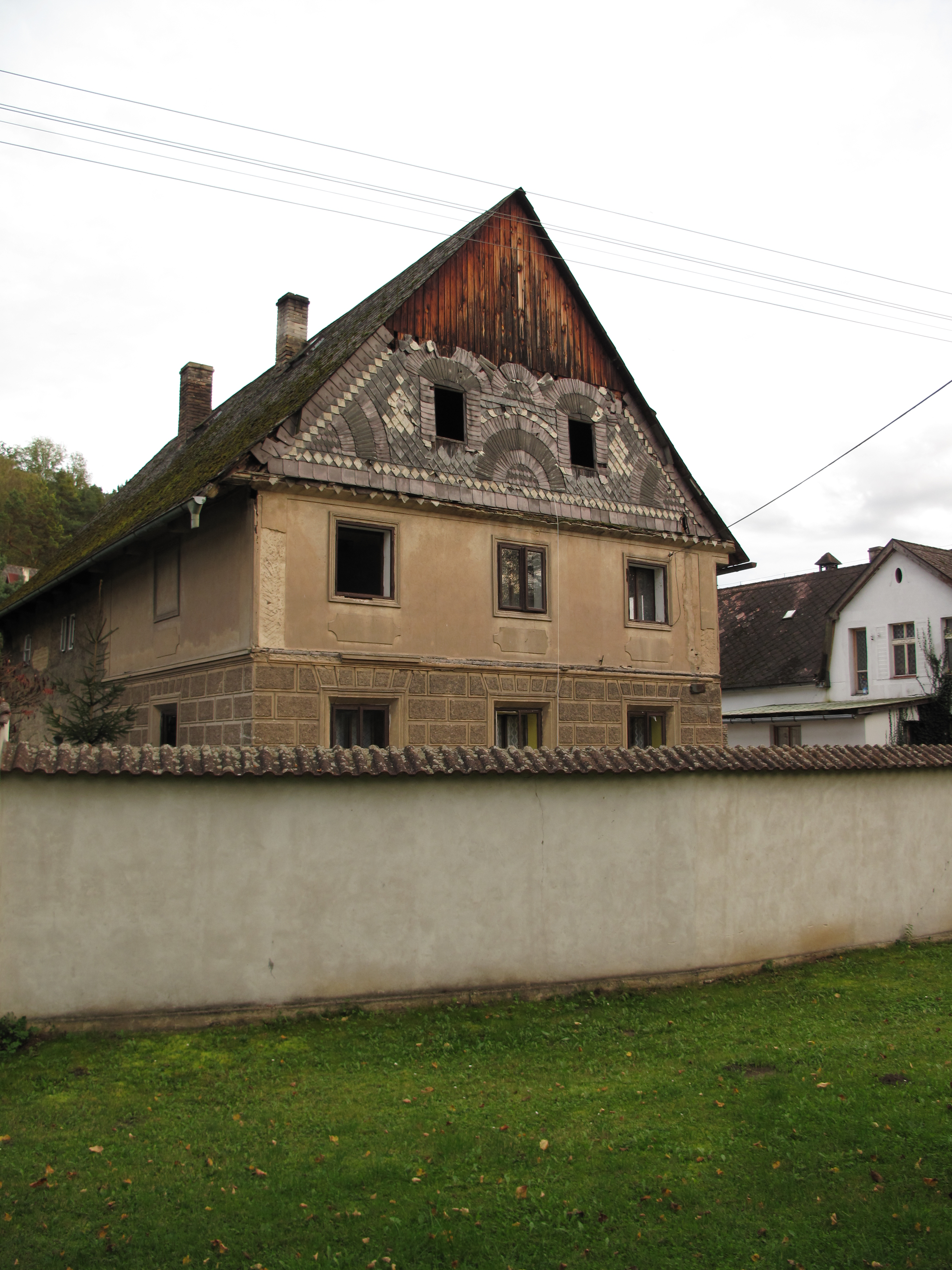 Ozdobný dům ve Střížovicích. Okres Litoměřice, Česká republika.